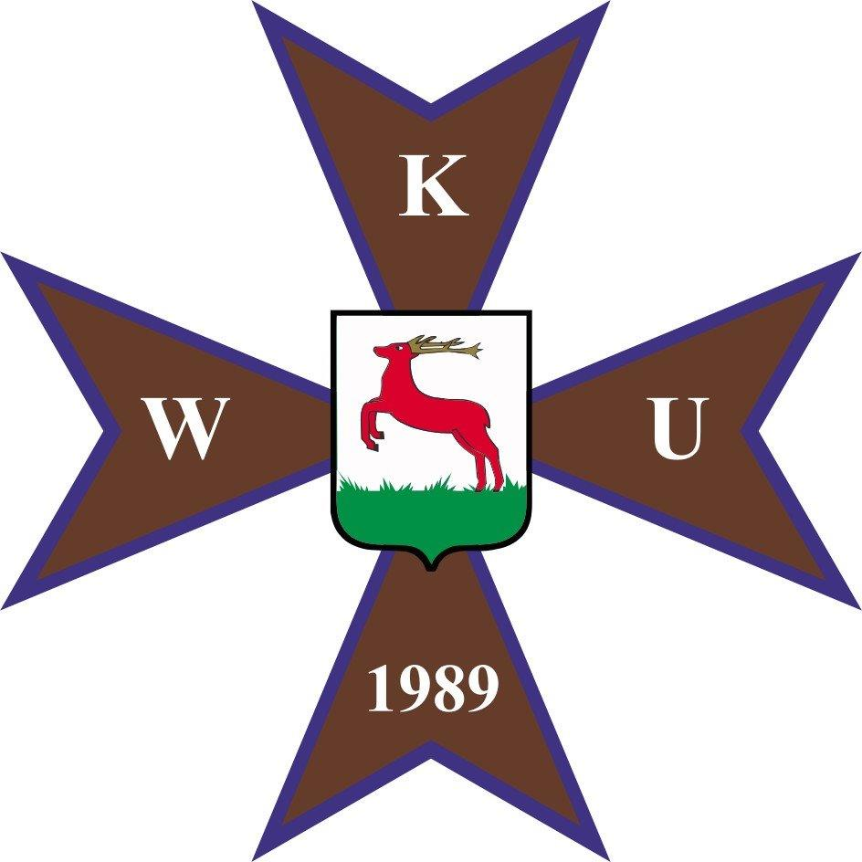 Odznaka Wojskowej Komendy Uzupełnień w Pile